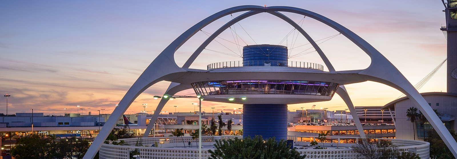 Edifício Temático em Los Angeles, Califórnia